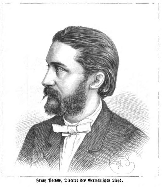 Franz Paetow, Vizekonsul in Rostock, 1868 Direktor des Germanischen Lloyds.